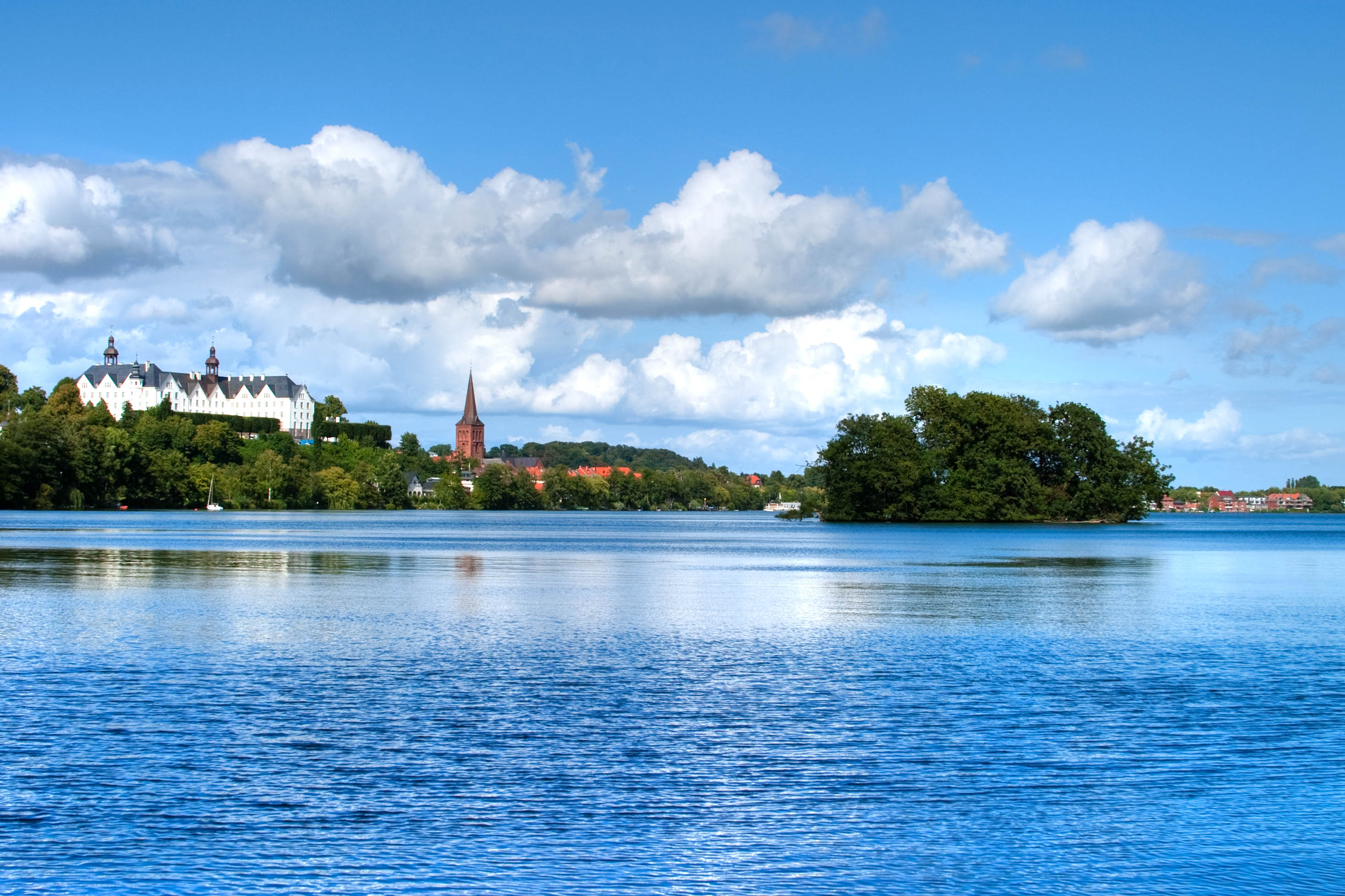 Zu sehen ist der Plöner See mit dem Plöner Schloss im Hintergrund